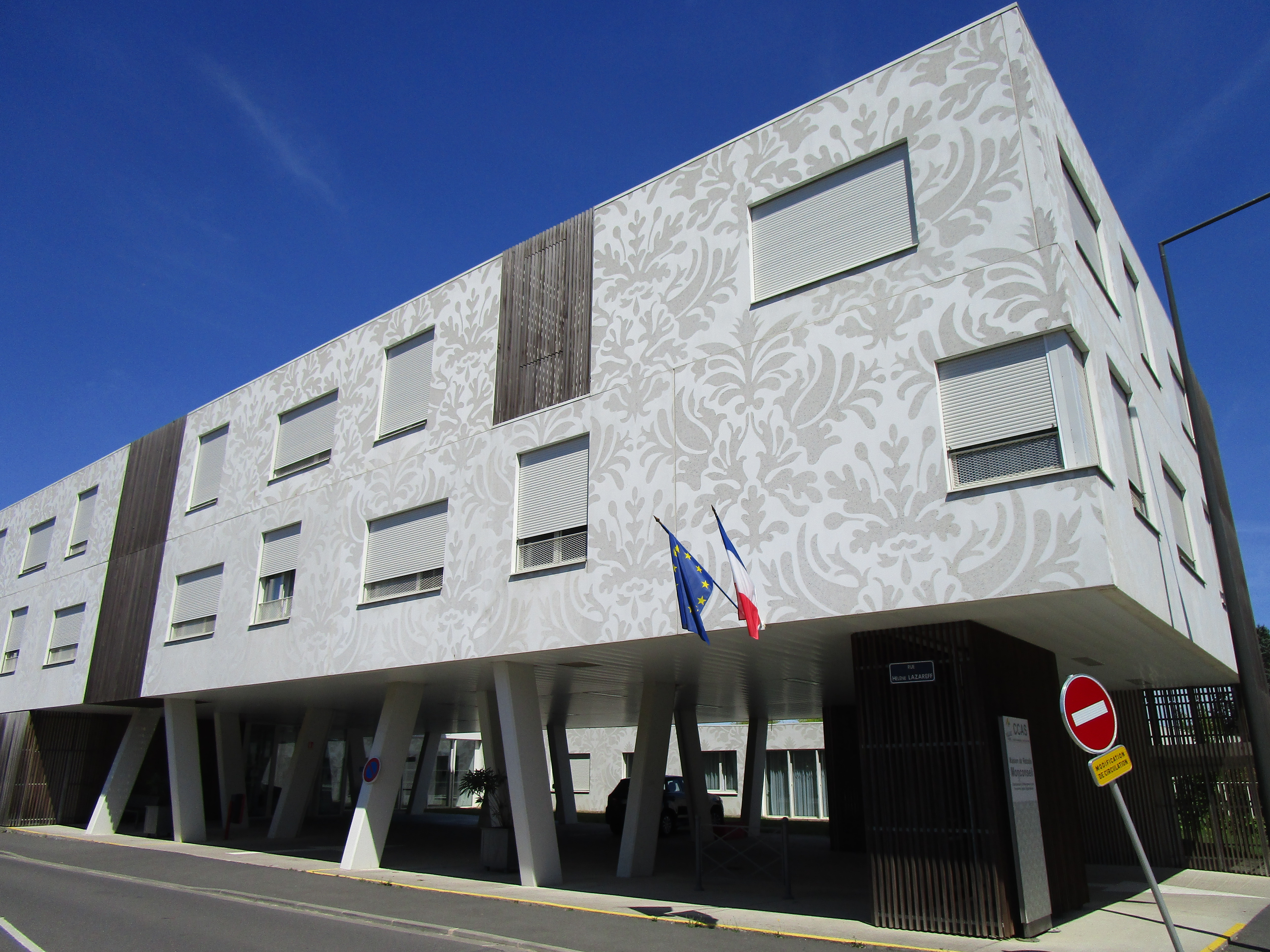 EHPAD et centre communal d’action sociale de Tours, dans le quartier Monconseil.